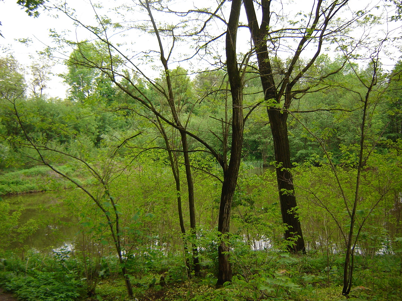 Staw na Przedmieściu Bukowskim w Td